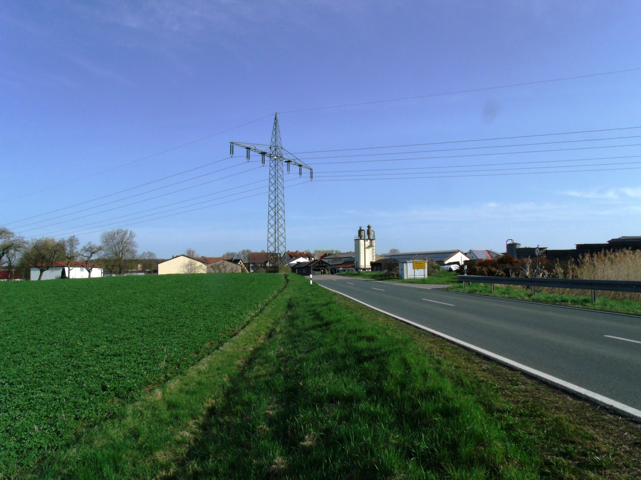 Winden, Ortsteil von Leutershausen im mittelfränkischen Landkreis Ansbach